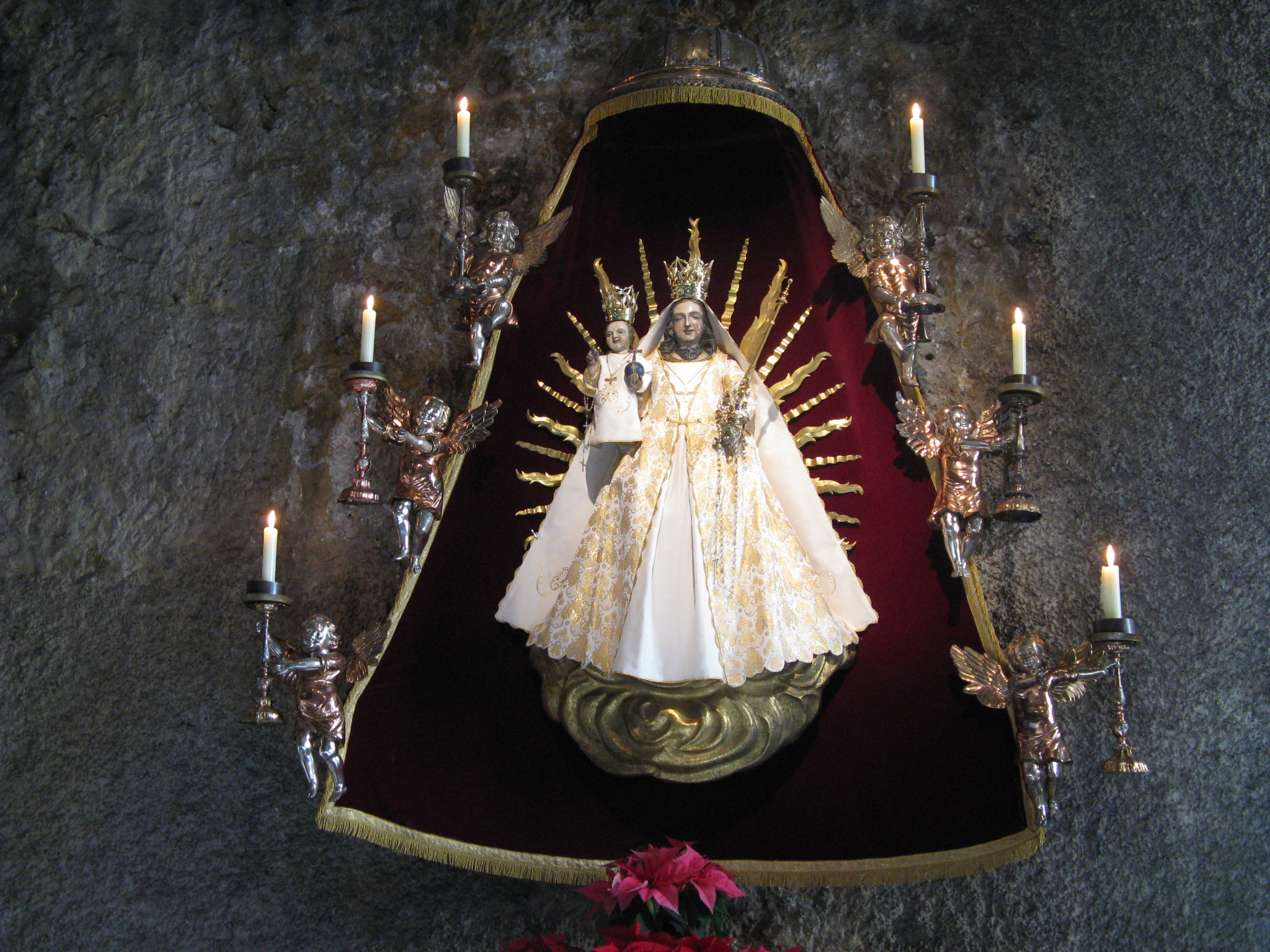 St. Mary votive image, Maria Stein, Switzerland